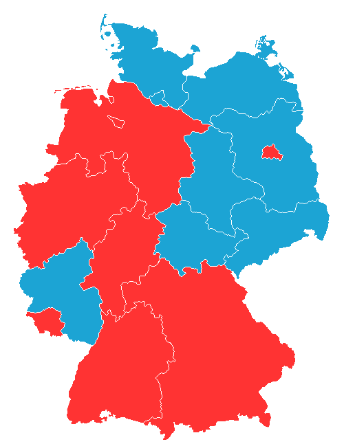 Karte mit einem Überblick über Verbote in den einzelnen deutschen Bundesländern das Kopftuch im Schuldienst zu tragen - rot eingefärbte Länder. Stand: 2007